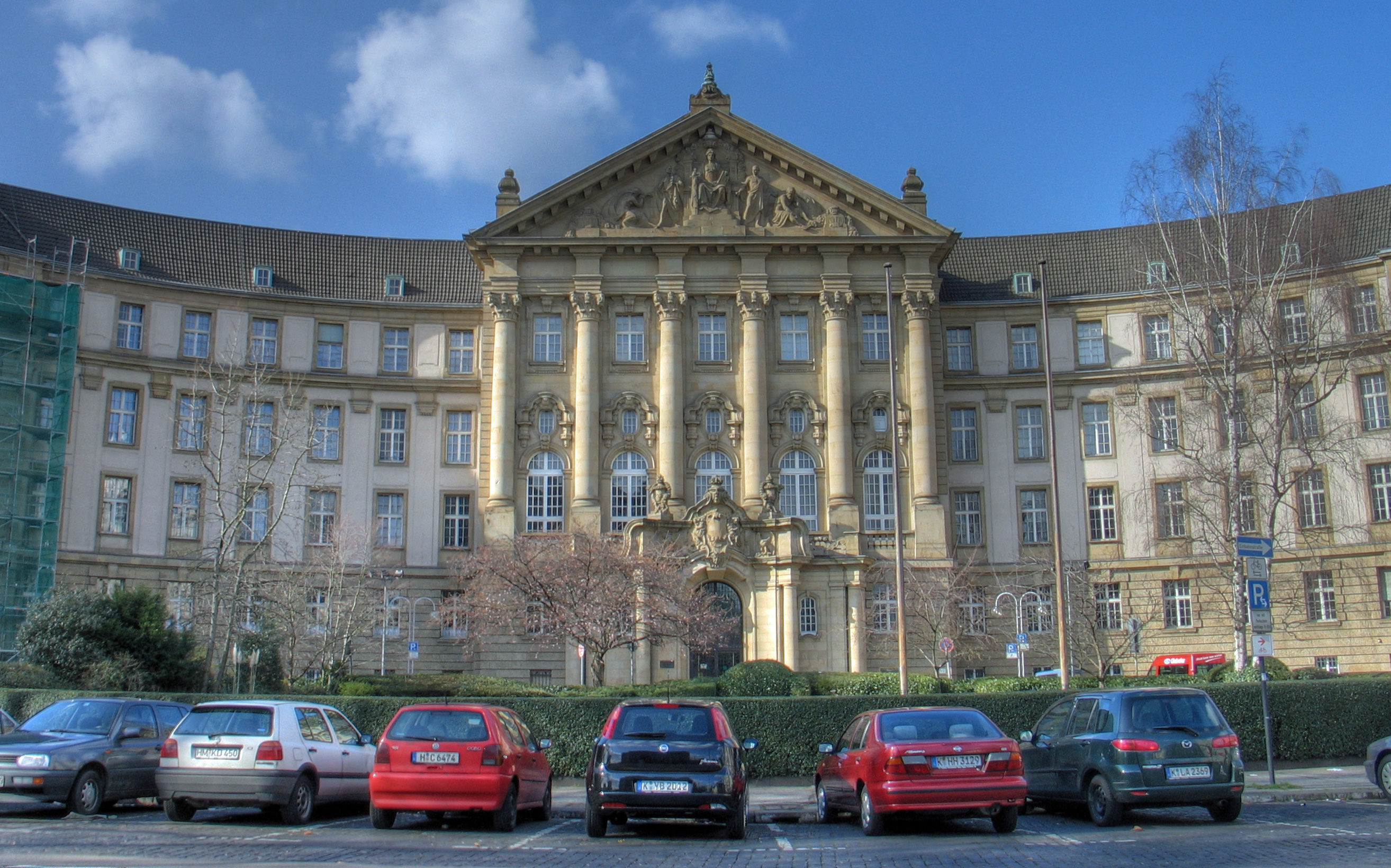 Oberlandesgericht, Cologne, Germany